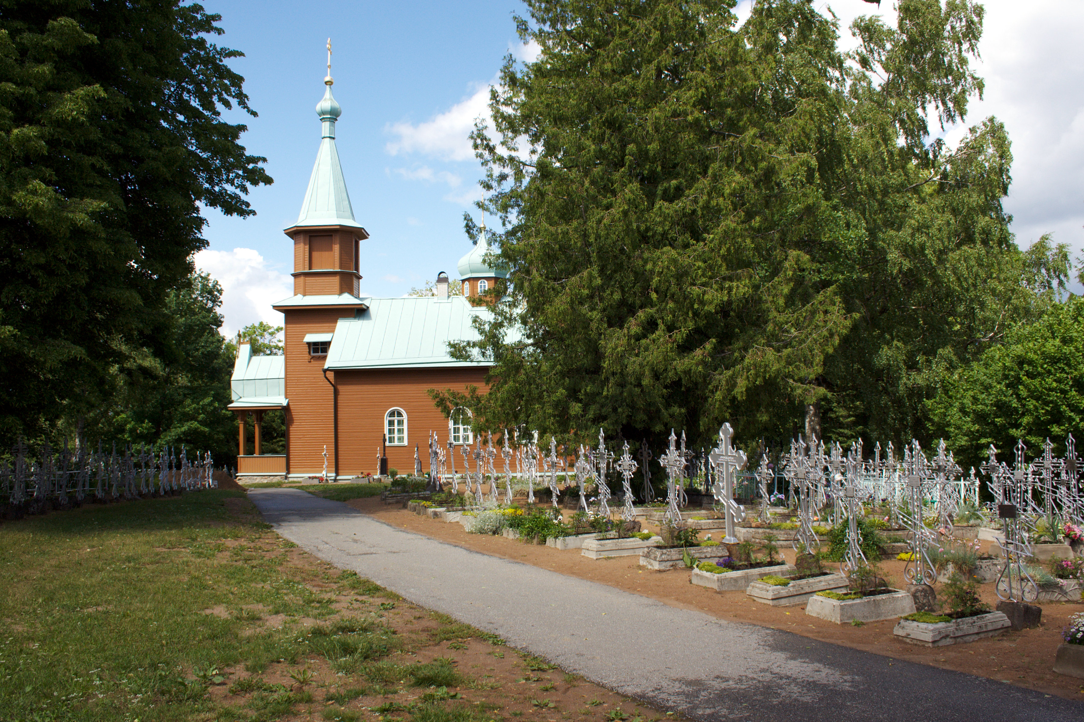 Kloostri surnuaed